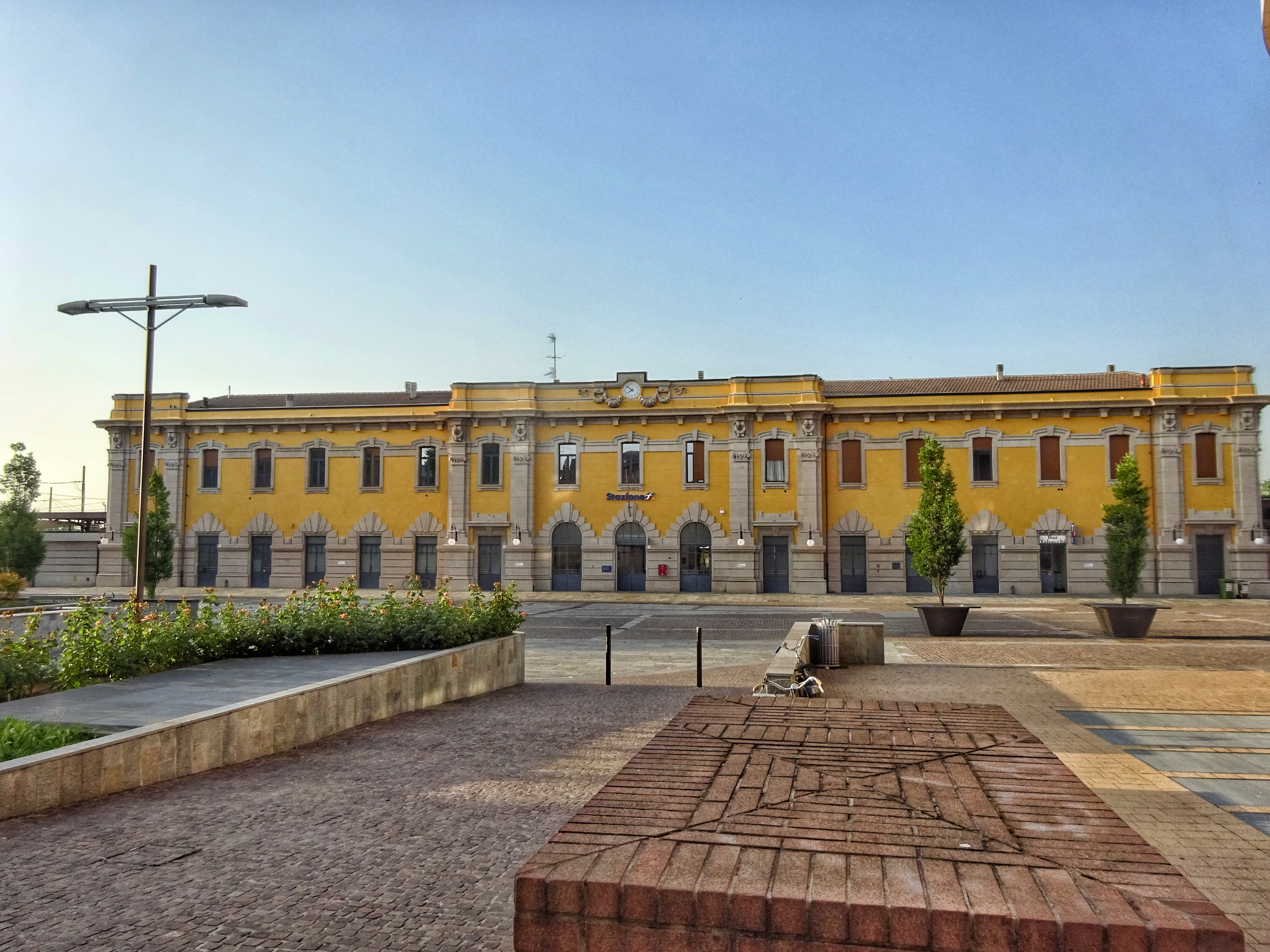 Piazzale della stazione ferroviaria di Fidenza a lavori conclusi.